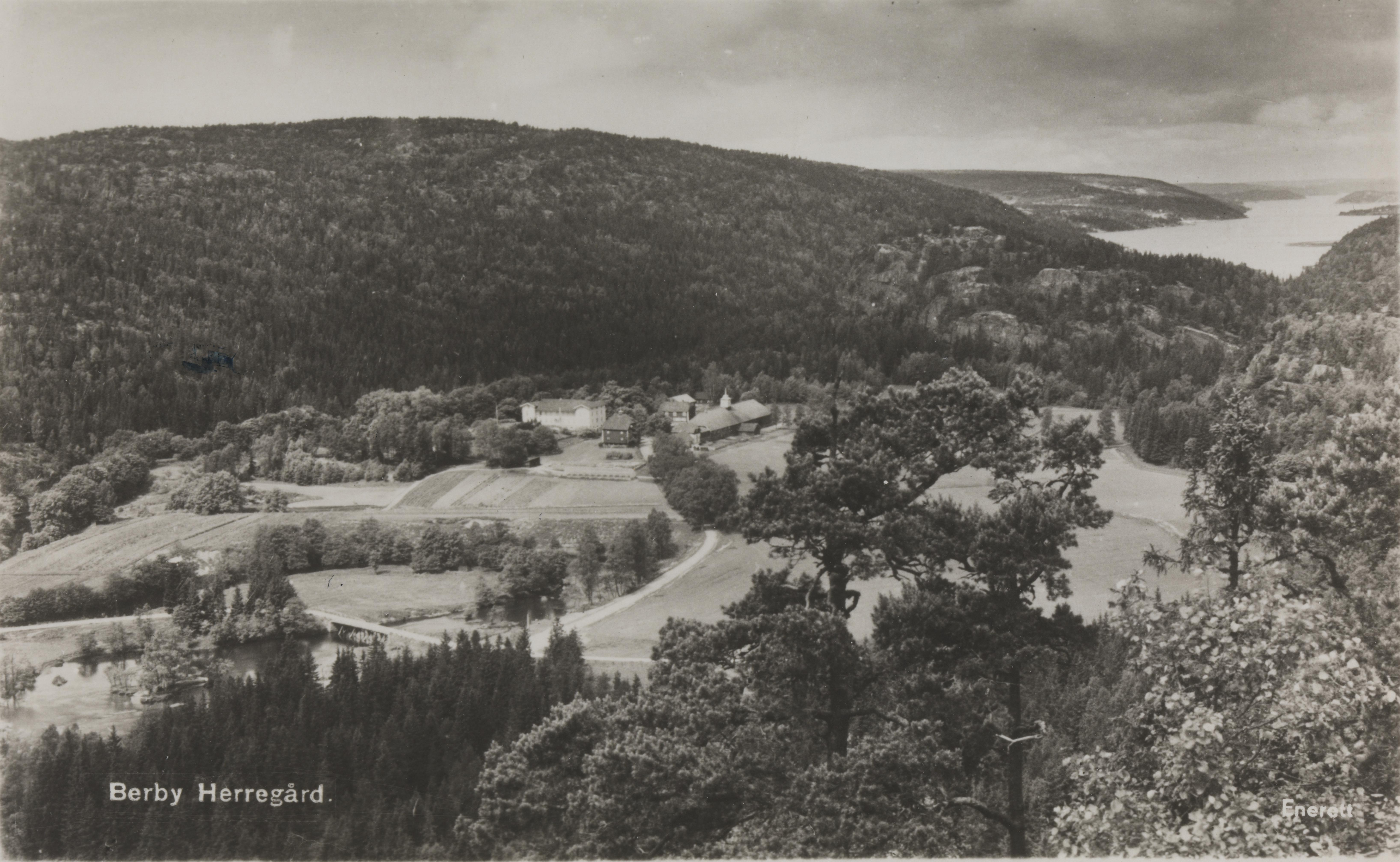 Bildet er hentet fra Nasjonalbibliotekets bildesamling Berby,Idd, Halden, Østfold